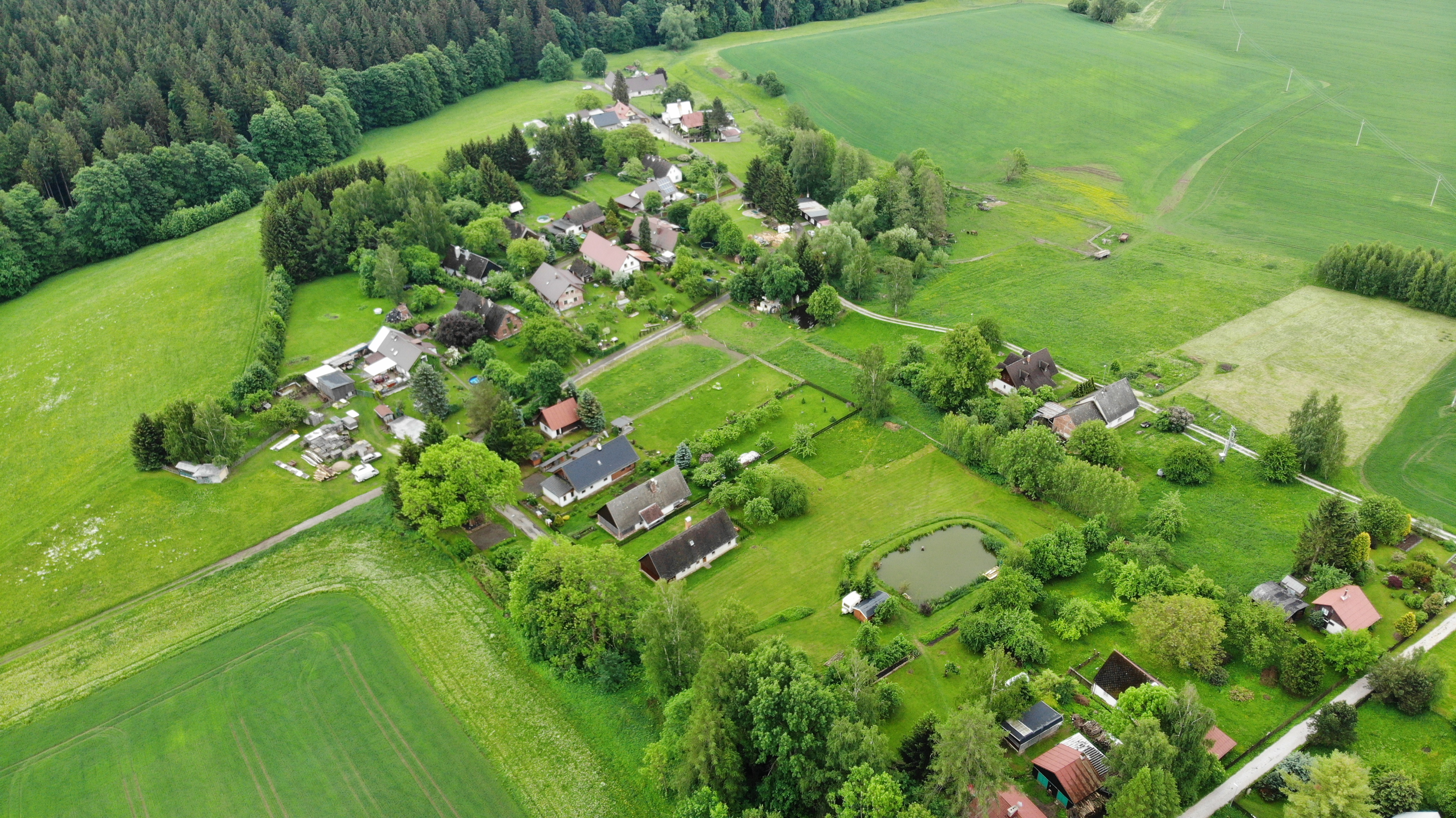 Janovice (Rudník), z ptačí perspektivy Project: Fotíme Česko.